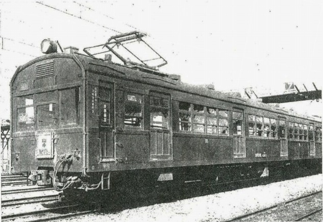 モハ63形電車。「昭和21年には約500輌ができ、昭和22年500輌ほどつくられる予定ですから、」と書かれている。鉄道ジャーナル1980年12月号P28に掲載されている同じ写真では、「池袋 交通博物館提供」とある。